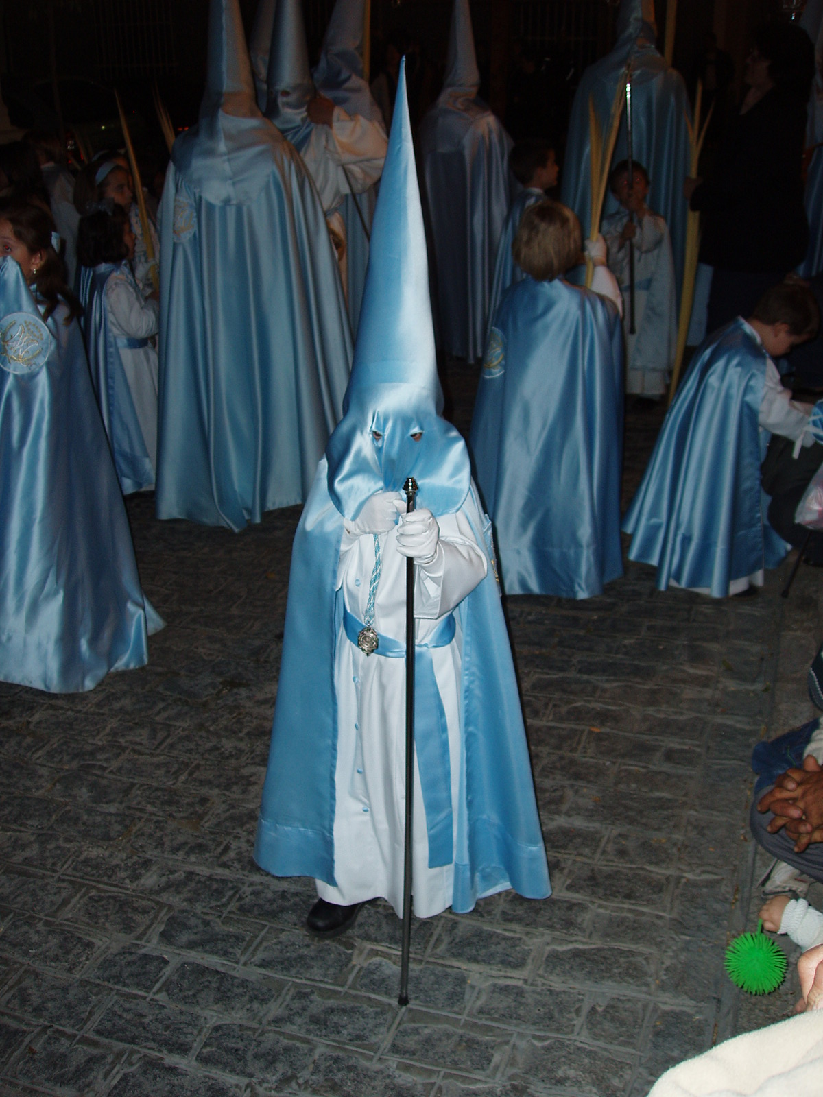 Penitente pequeño. Domingo de Ramos. Semana Santa en El Puerto de Santa María, Cádiz, España.